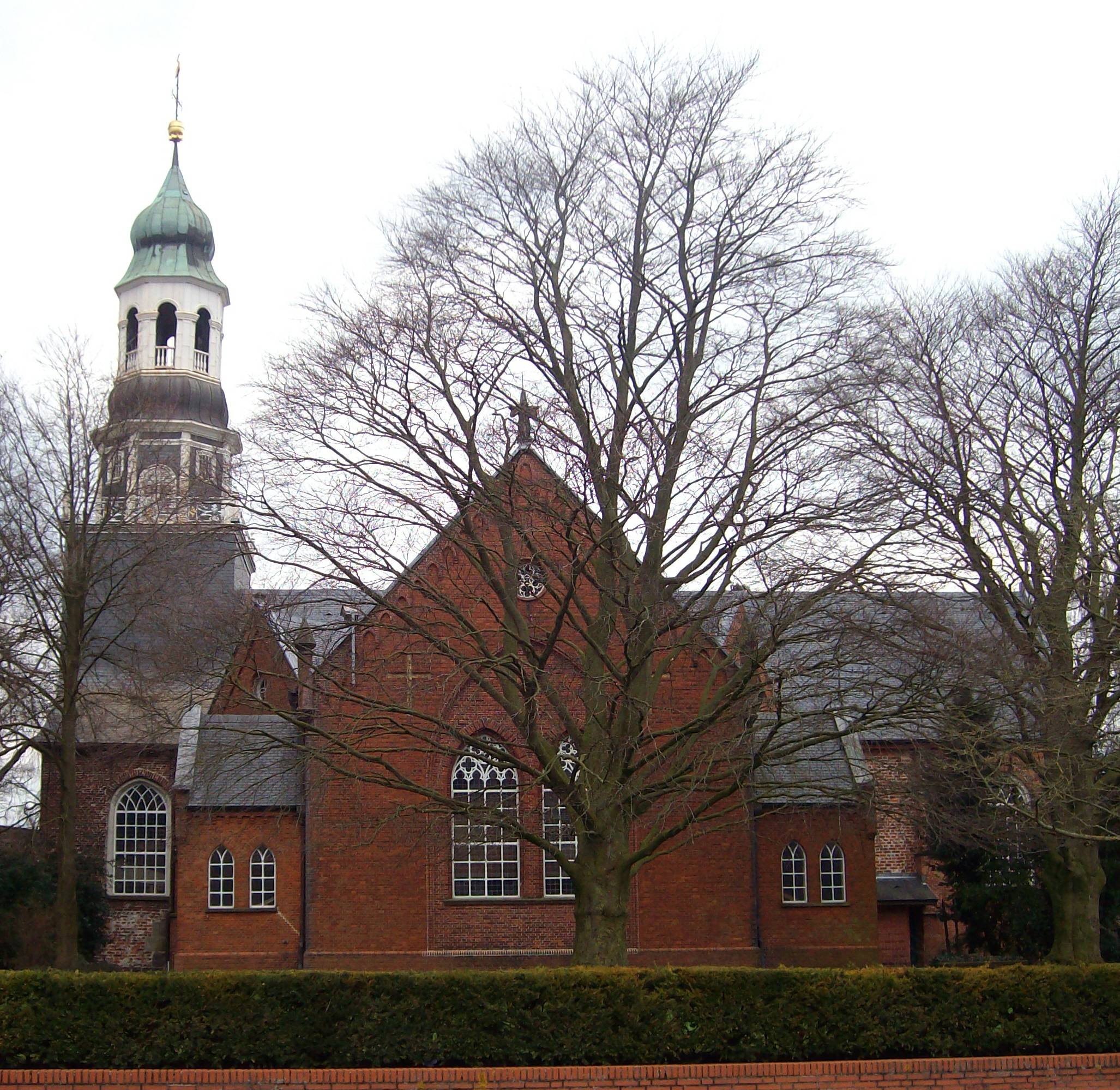 Leer, Lutherkirche